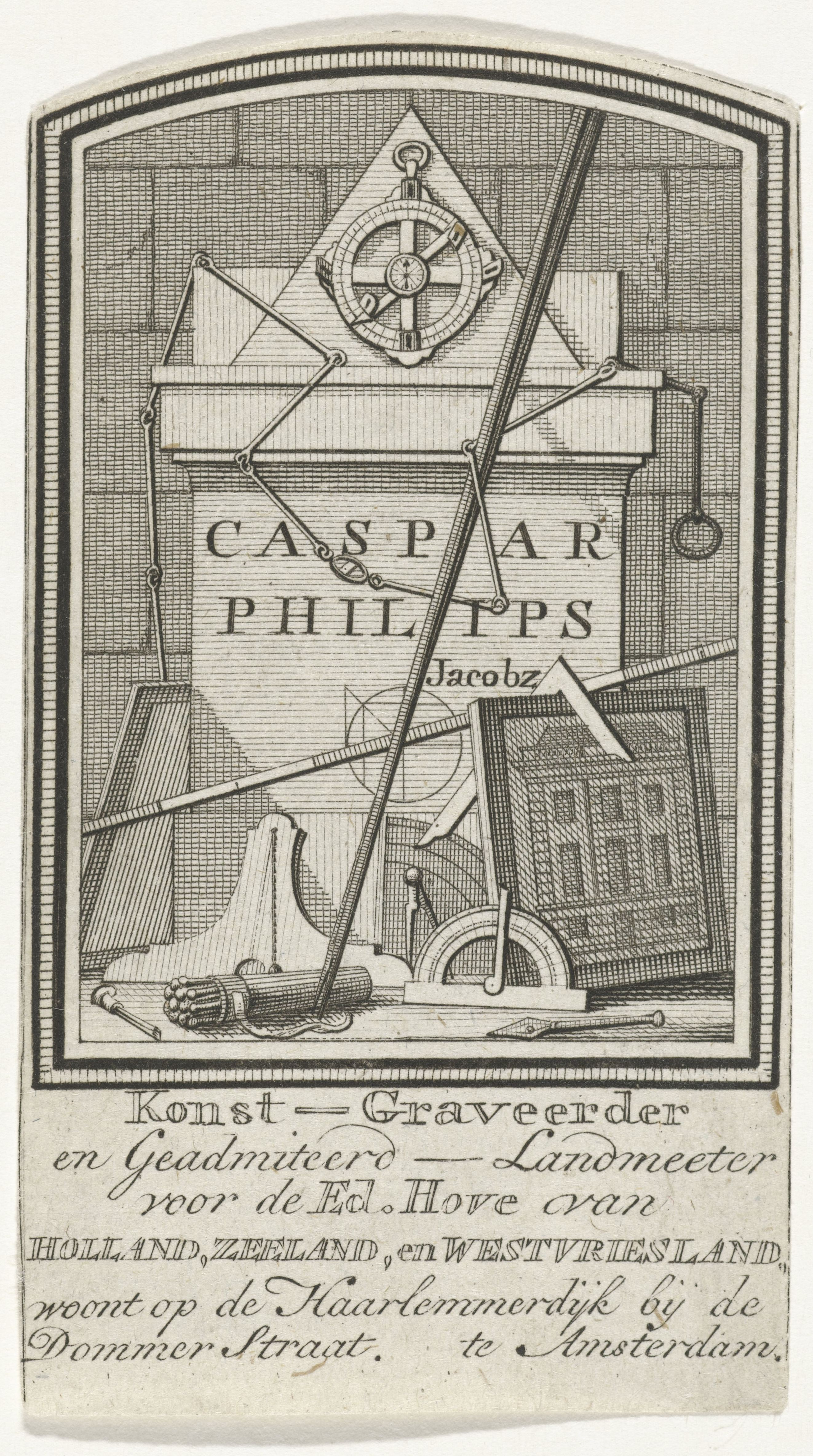 IdentificatieTitel(s): Visitekaartje van Caspar Jacobsz. PhilipsObjecttype: prent visitekaartje Objectnummer: RP-P-OB-60.133Opschriften / Merken: verzamelaarsmerk, verso, gestempeld: Lugt 2228Omschrijving: Visitekaartje van de kunstenaar Caspar Jacobsz. Philips, met zijn naam op een muur, omringd door allerlei attributen die de kunsten symboliseren.VervaardigingVervaardiger: prentmaker: Caspar Jacobsz. Philips (vermeld op object)Plaats vervaardiging: AmsterdamDatering: 1752 - 1789Fysieke kenmerken: etsMateriaal: papier Techniek: etsenAfmetingen: blad: h 94 mm × b 53 mmOnderwerpWat: symbolische representaties, allegorieÃ«n en emblemata ~ kunst; 'Arte' (Ripa)Wie: Caspar Jacobsz. PhilipsVerwerving en rechtenVerwerving: onbekendCopyright: Publiek domein